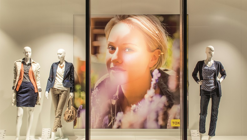 Takko Filiale